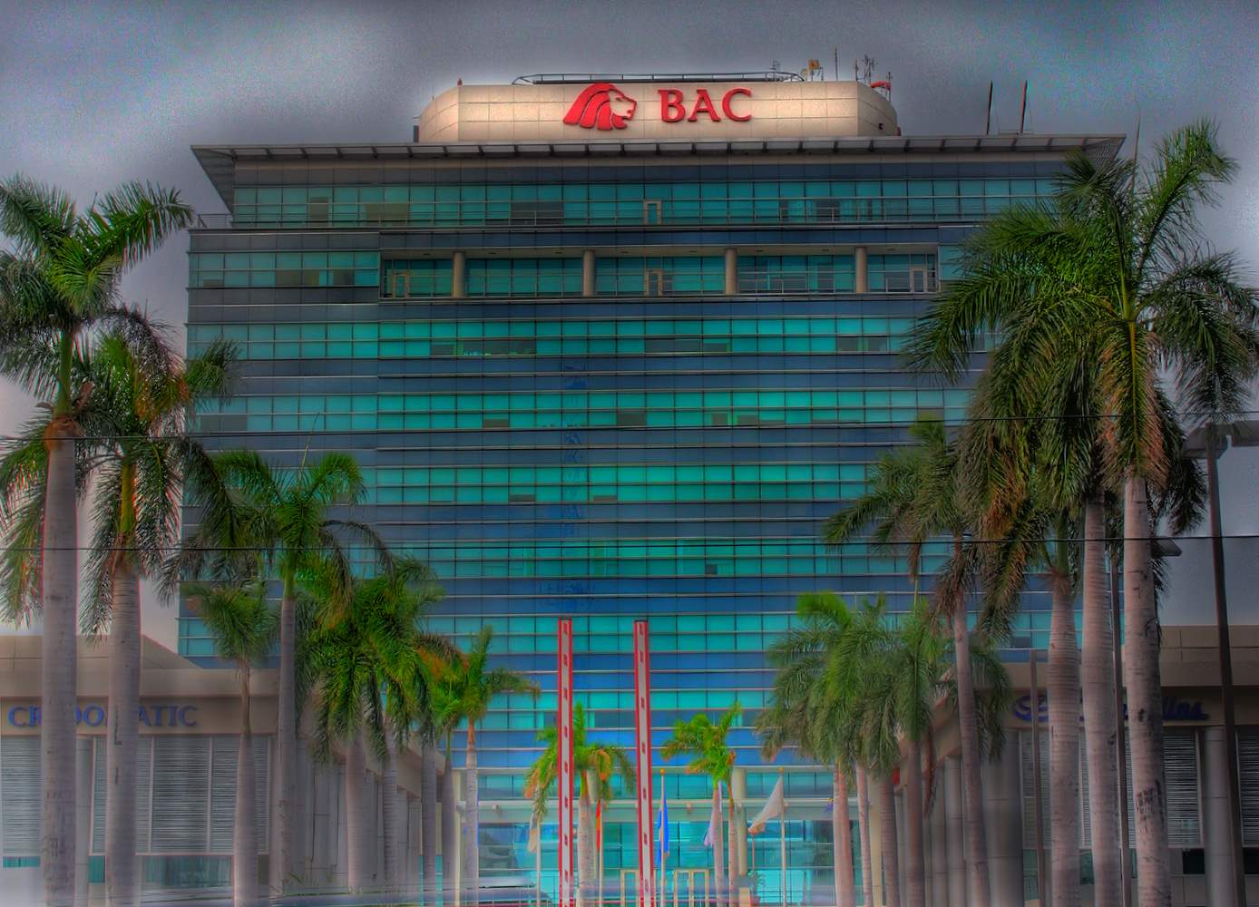 Managua